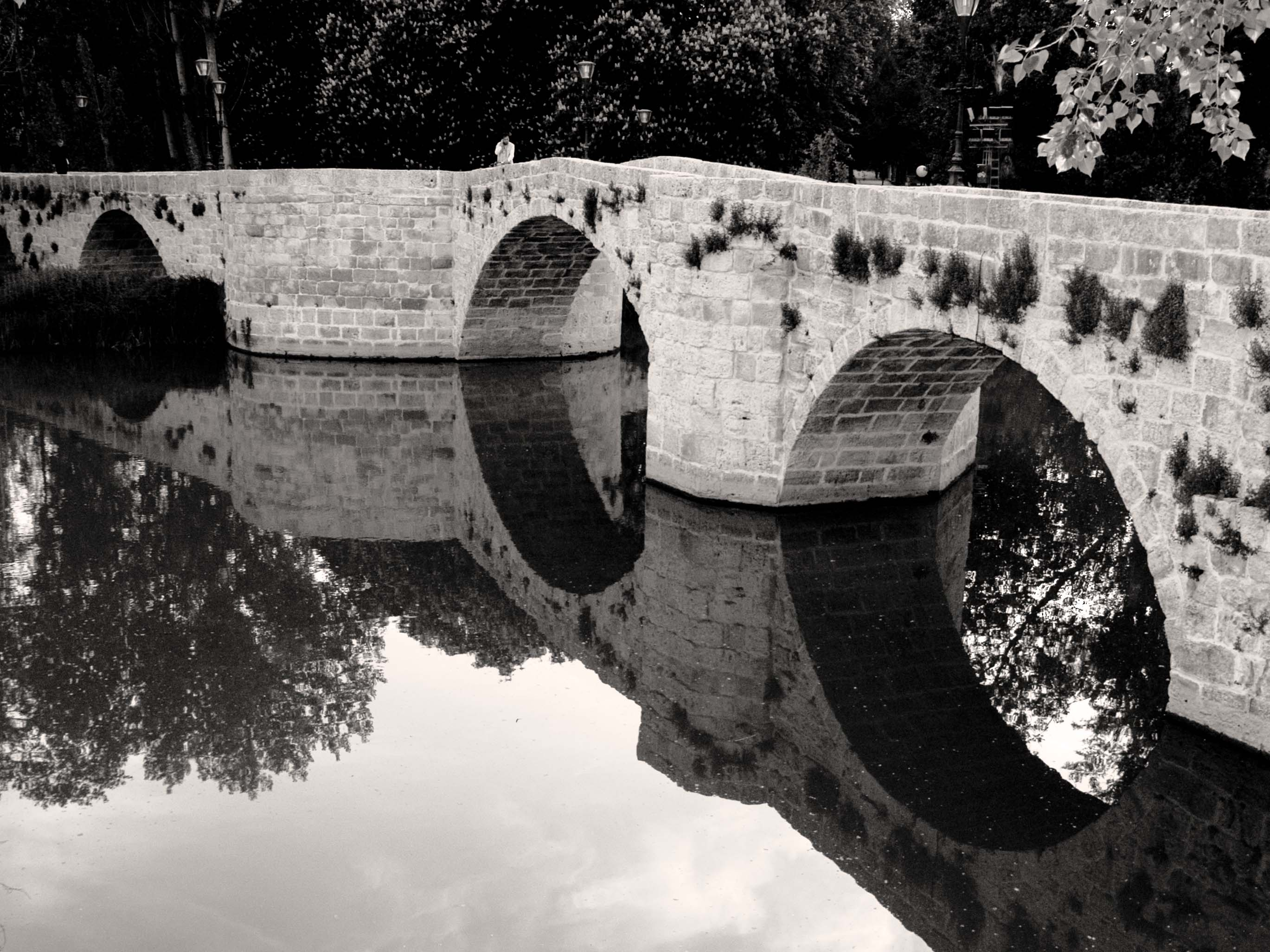 Explore: #198, 17 Mayo